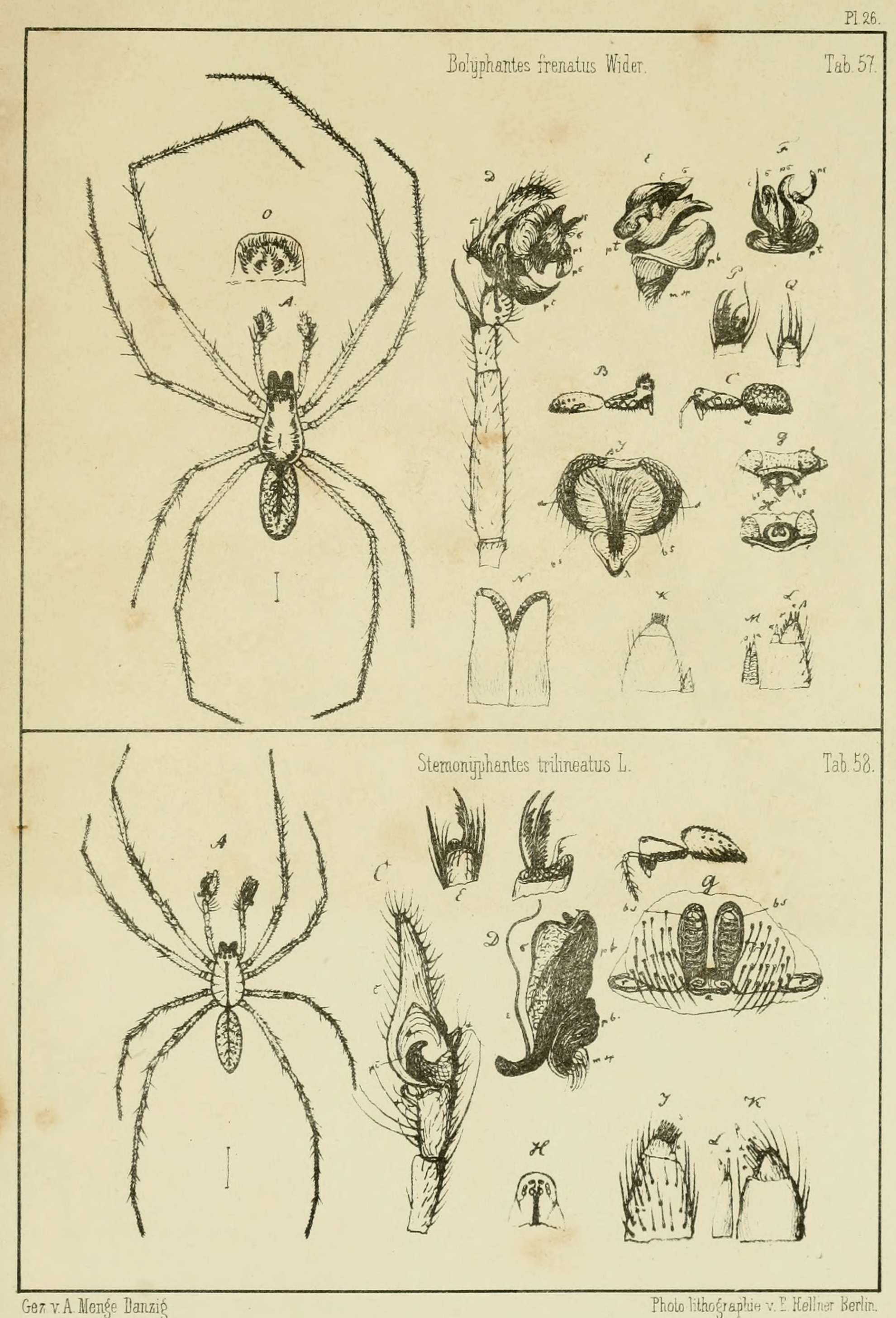 Anton Menge: Preussische Spinnen. I. Abtheilung. Tafel 26 - 57. Bolyphantes frenatus Wider. 58. Stemonyphantes trilineatus L.. In: Schriften der Naturforschenden Gesellschaft in Danzig. Erster Band drittes und viertes Heft. Druck von A. W. Kafemann, Danzig 1866